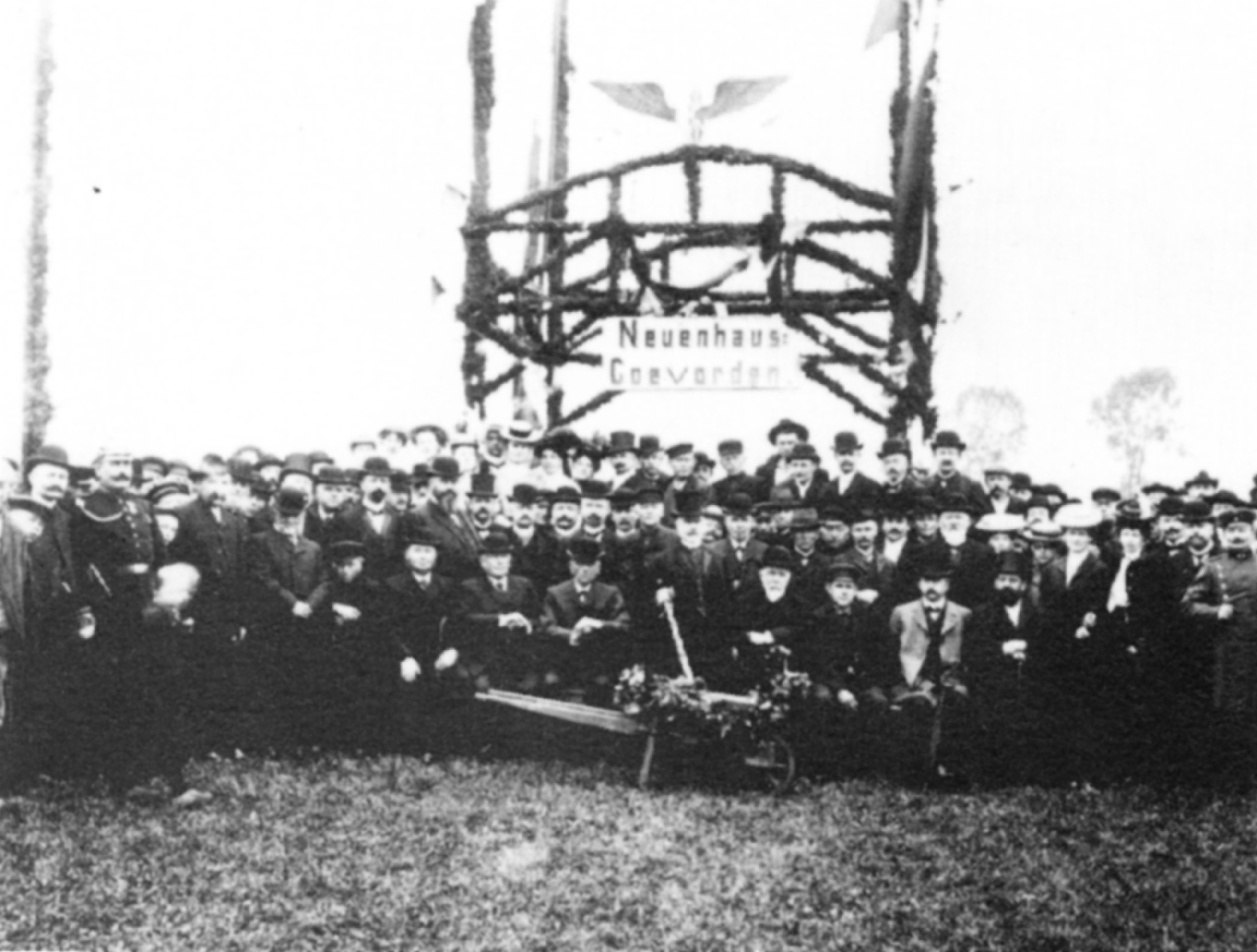 Der erste Spatenstich für den Bau der Eisenbahnstrecke von Neuenhaus nach Coevorden am 21. September 1907